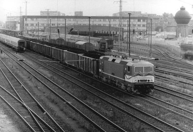 Cottbus, Güterzug, E-Lok ADN-ZB Weißflog -30.9.89 Cottbus: Der 2000 Kilometer elektrifizierte Eisenbahnstrecke der DDR seit dem X. Parteitag SED ist in Cottbus übergeben worden. Der erste Zug mit Kohle aus dem Lausitzer Revier, der durchgängig unter Fahrdraht nach Berlin gelangte, wurde von der 500. Serienlok Baureihe 243 aus dem Kombinat Lokomotivbau-Elektrotechnische Werke Henningsdorf gezogen.